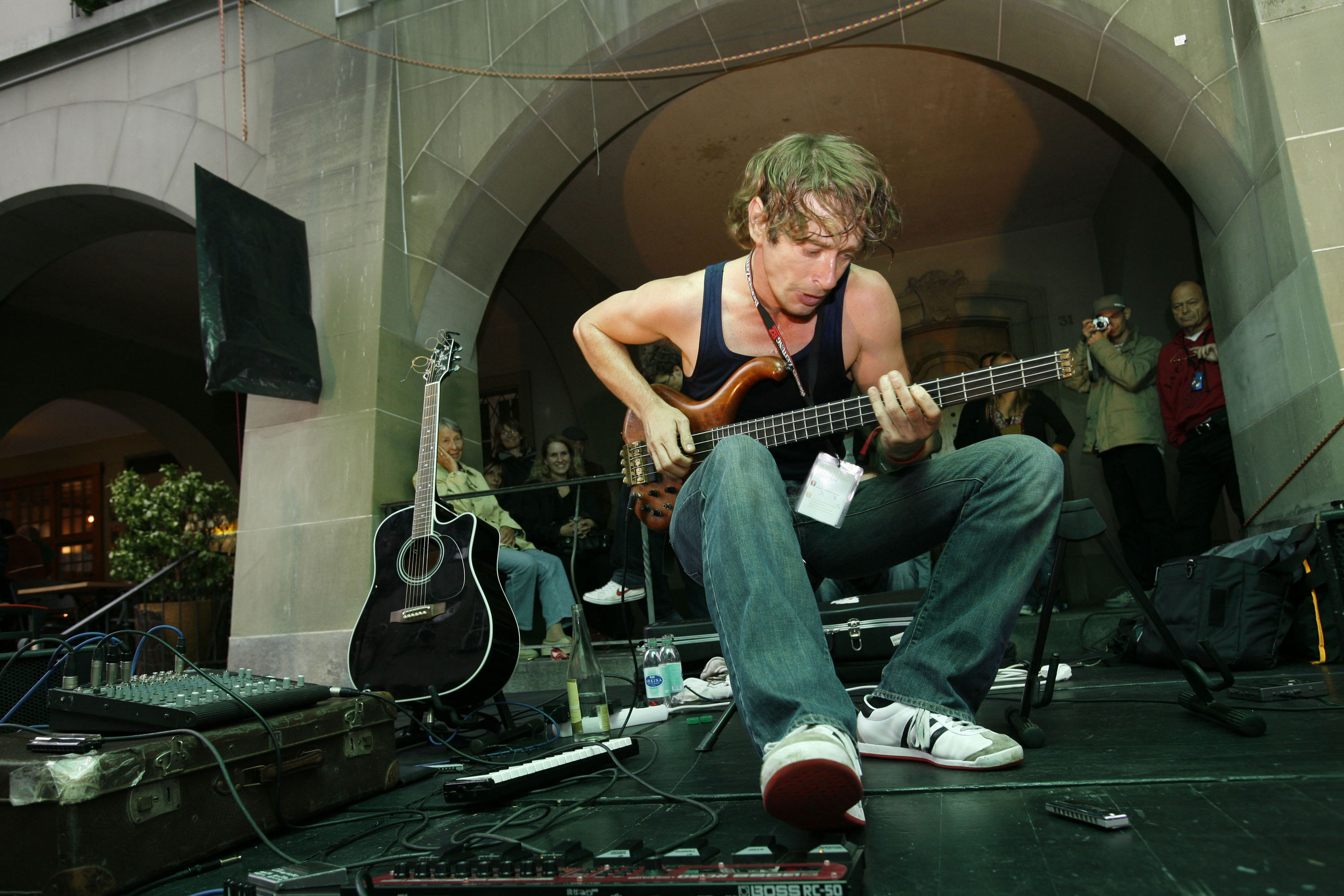 deutscher Musiker ricoloop beim Buskers Bern Straßenmusikfestival 2007